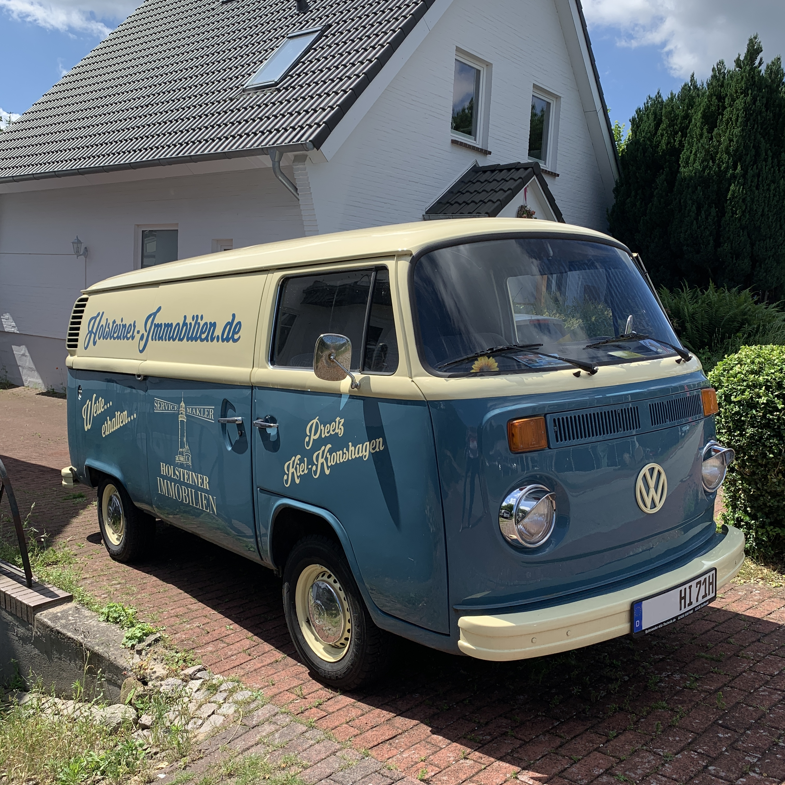 Volkswagen T2b Kasten